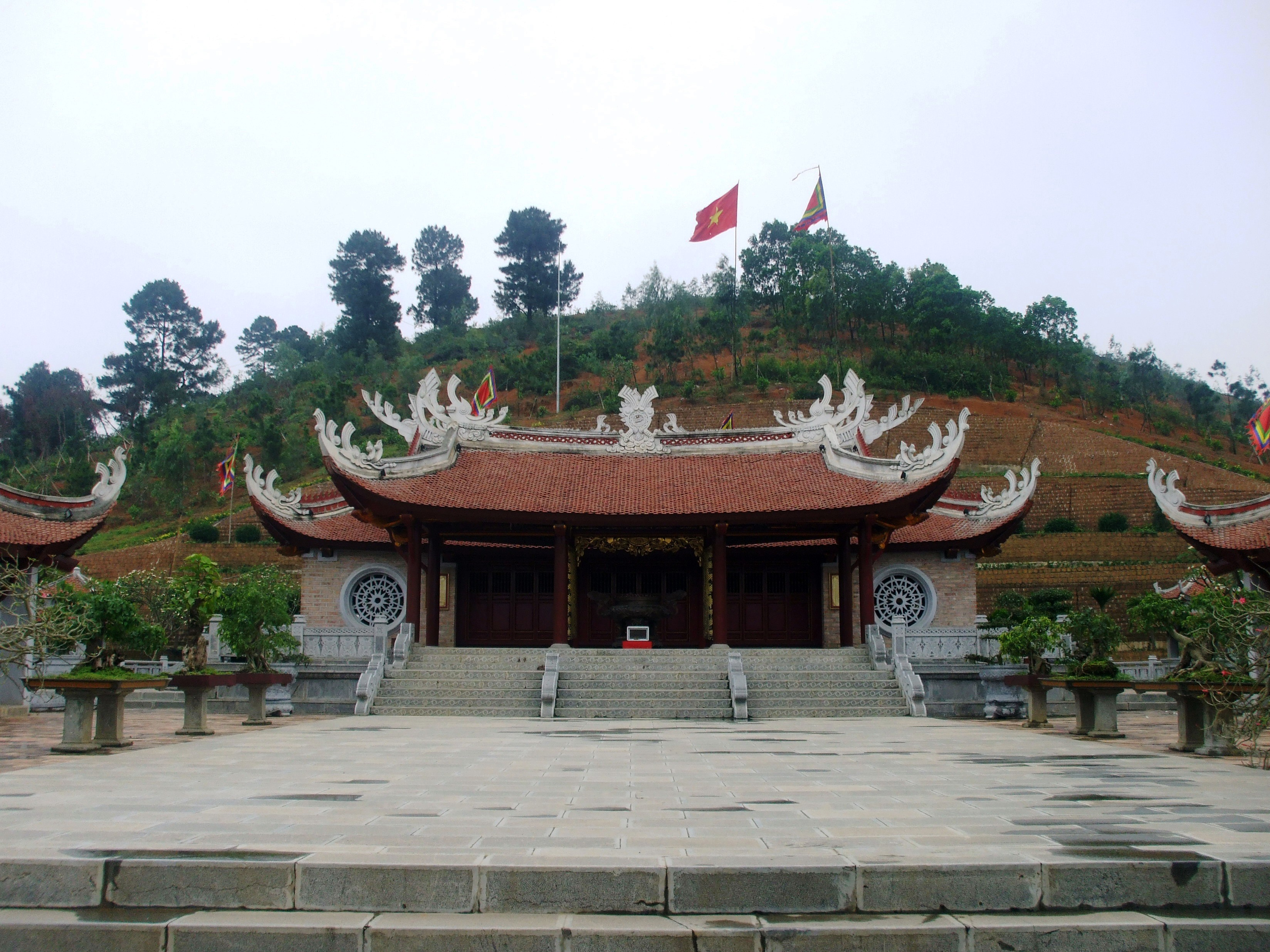 Đền thờ chính thờ Lạc Long Quân tại đồi Sim, nằm trong quần thể di tích lịch sử đền Hùng (Phú Thọ, Việt Nam).